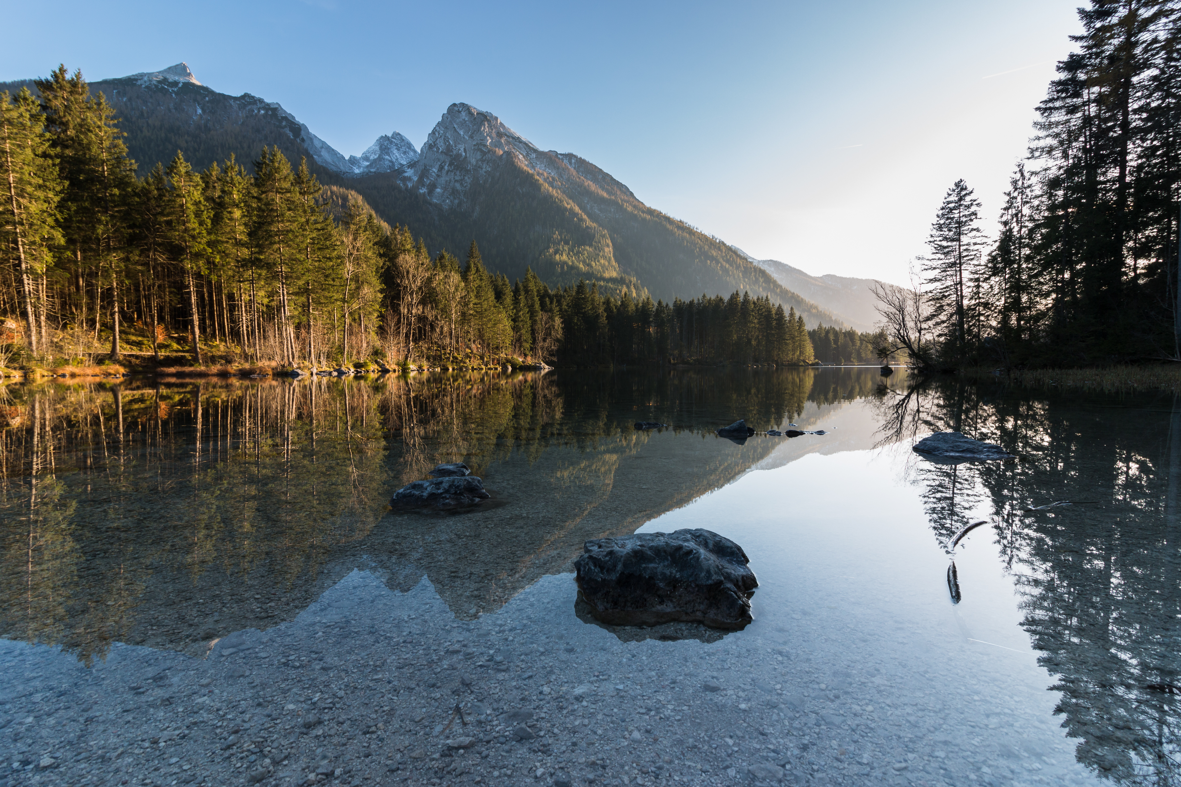 Der Hintersee im Nationalpark Berchtesgaden bei Ramsau mit Blick auf den Hochkater und den Zauberwald. Im Vordergrund kann man einige größere Steine erkennen, die zur Bildkomposition beitragen. Die Spiegelung der Berge im Wasser tragen ebenfalls zur Bildkomposition bei.